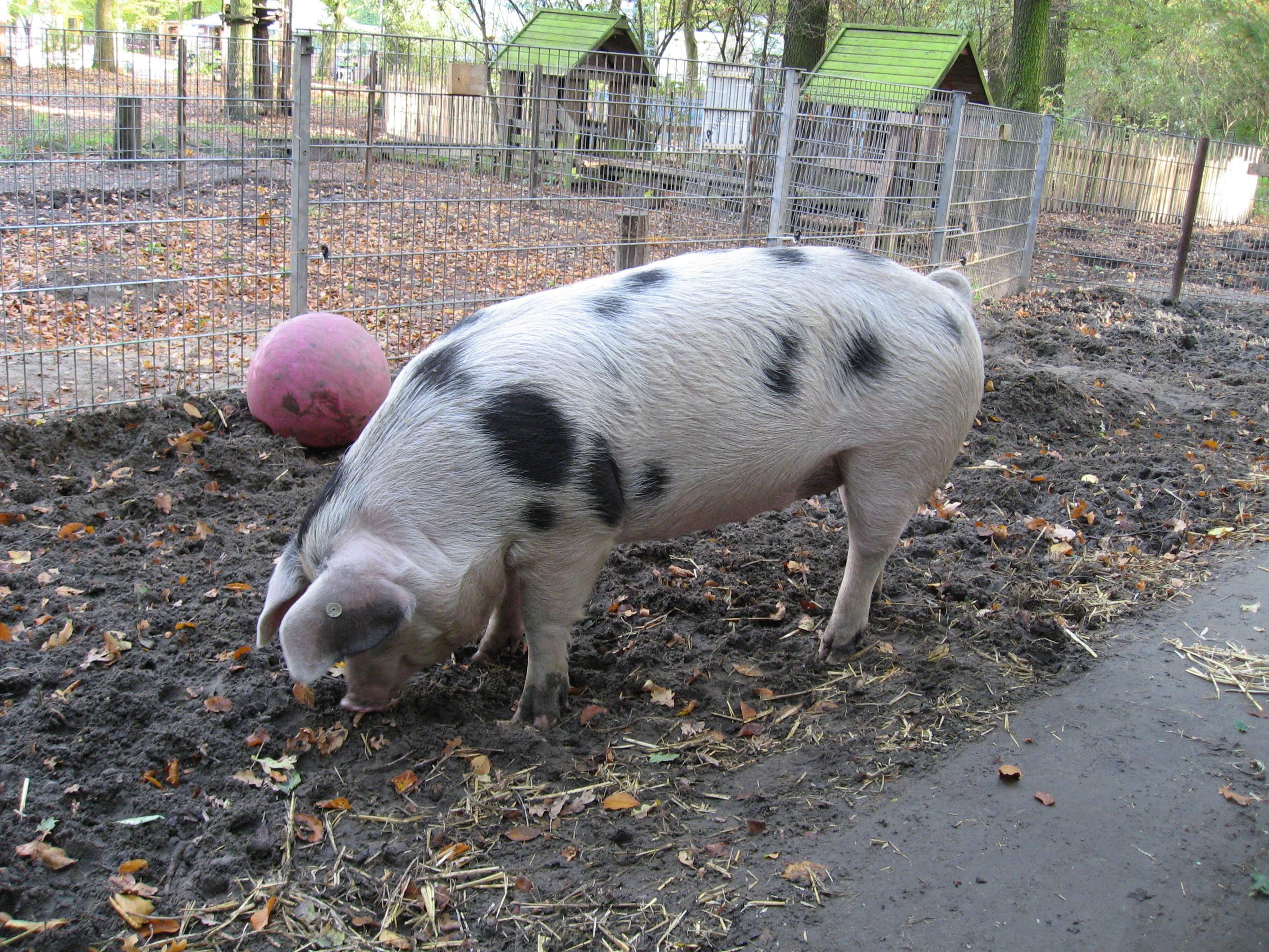 Dortmund, Fredenbaumpark, Abenteuerspielplatz, alte Schweinerasse